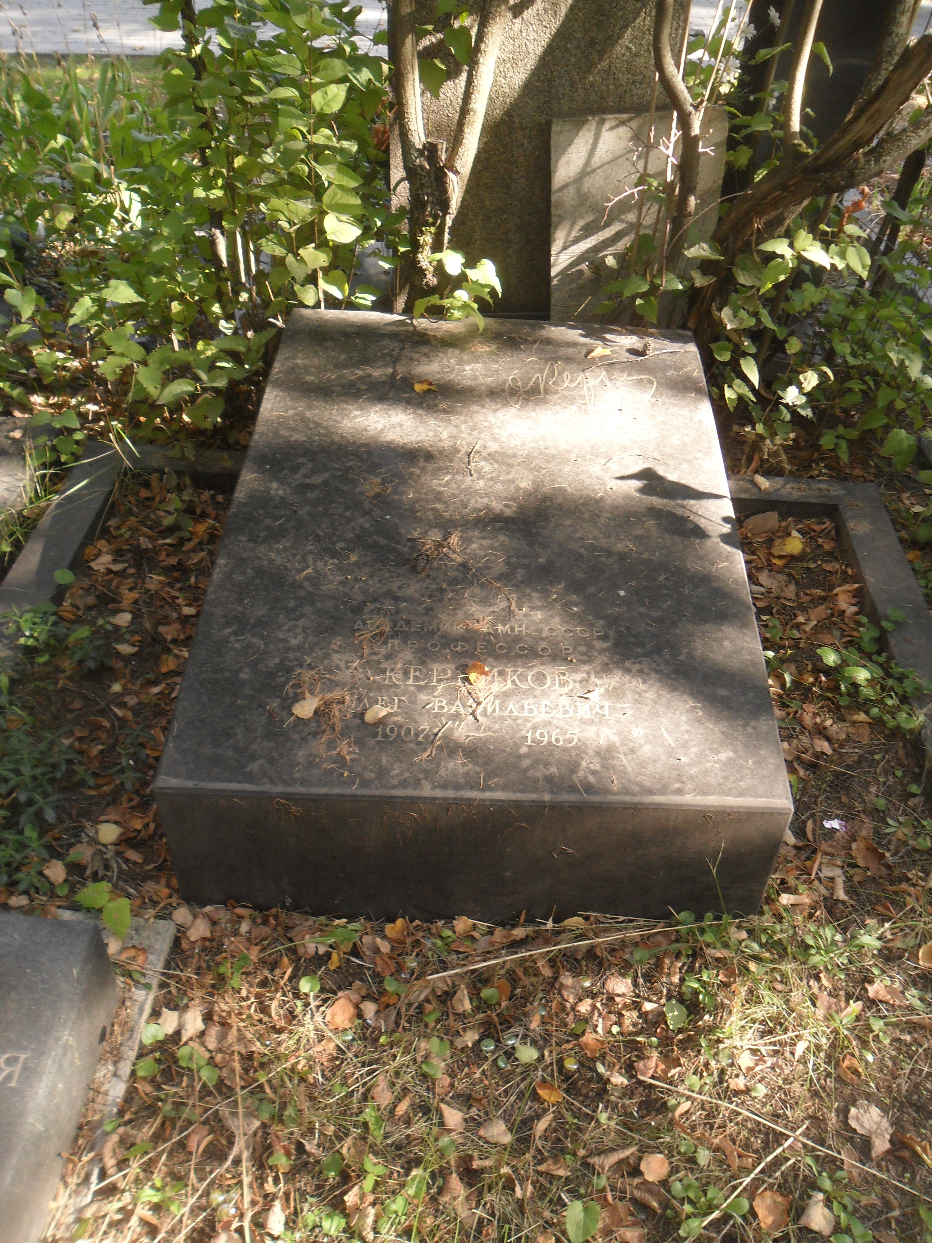 Могила академика Олега Кербикова на Новодевичьем кладбище Москвы.